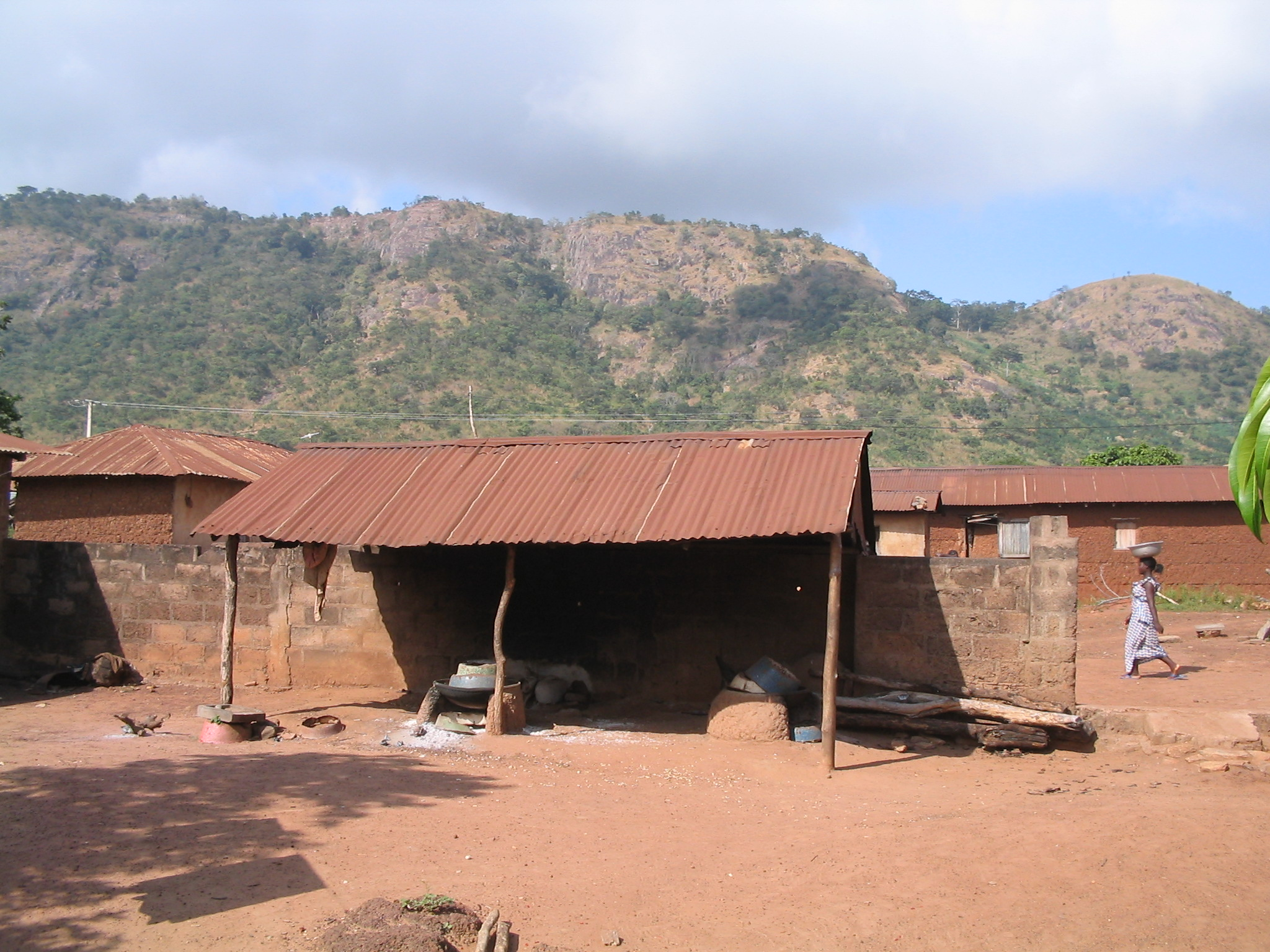 Savalou, Benin